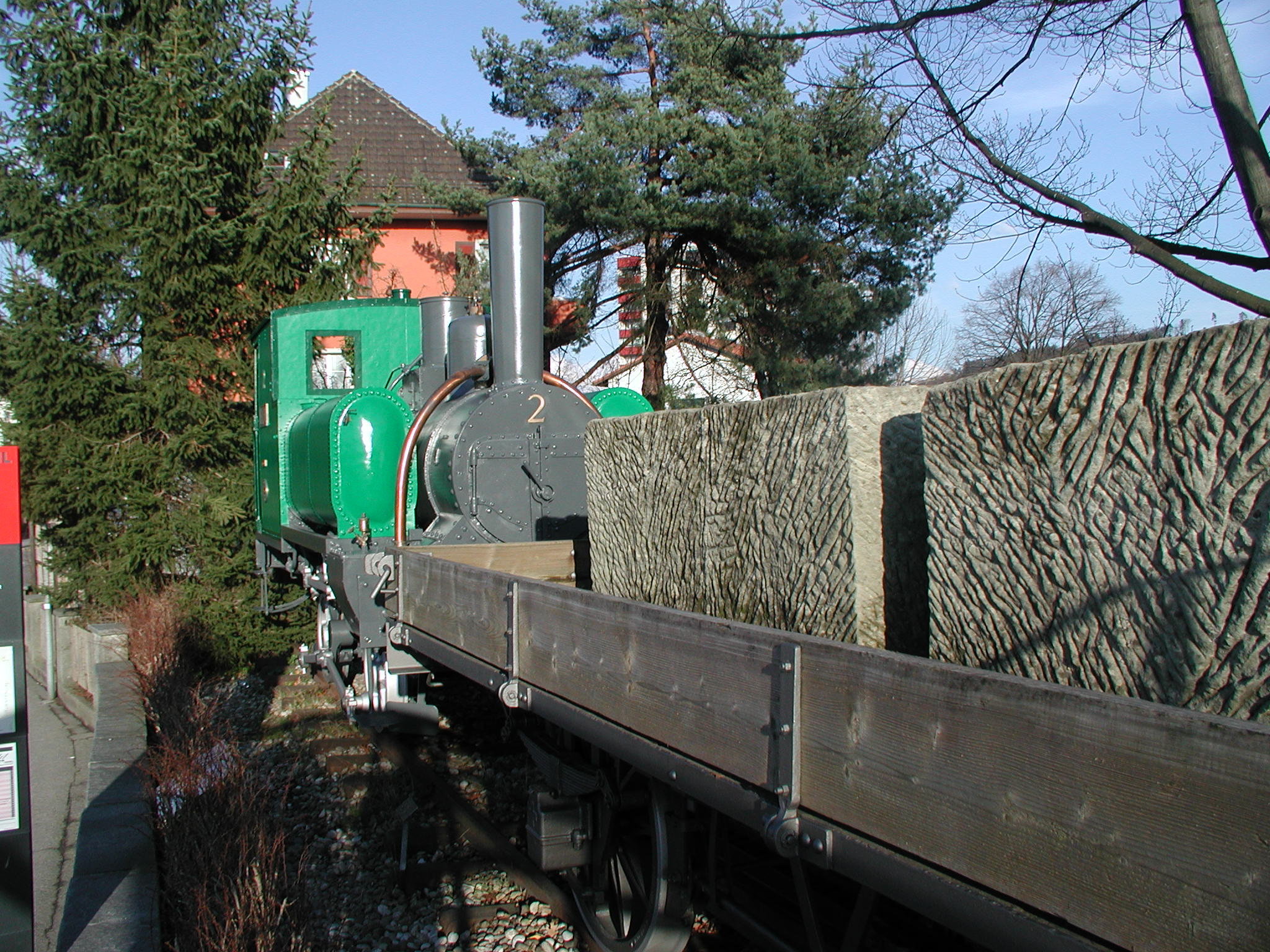 An der Bushaltestelle Zollgasse aufgestellte Zahnradlokomotive mit Wagen, die von 1876 bis 1902 Sandsteine aus den Brüchen über das Anschlussgleis in die Station Ostermundigen transportierte.